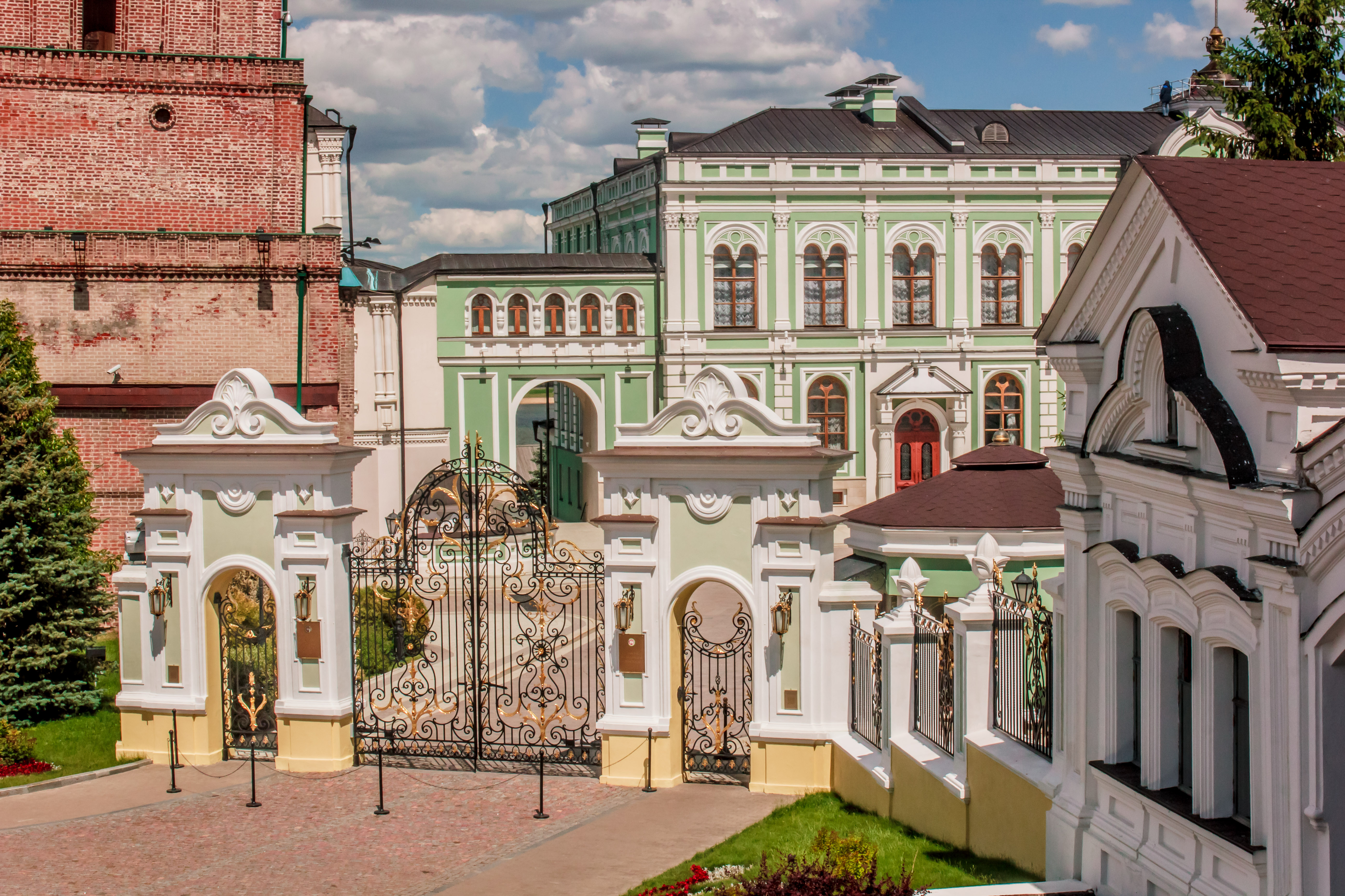 Дворец губернаторский: Кремль, Казань, Татарстан